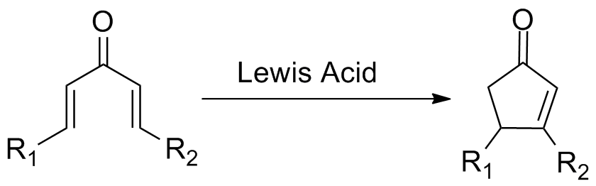 Nazarov cyclization